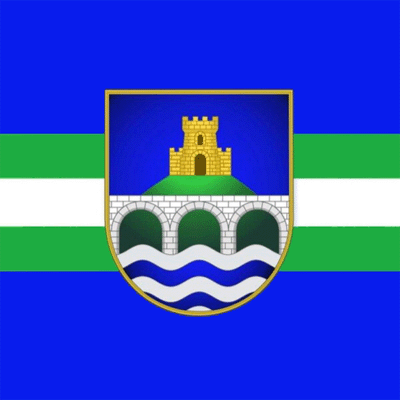 Прапор Жванецької ОТ